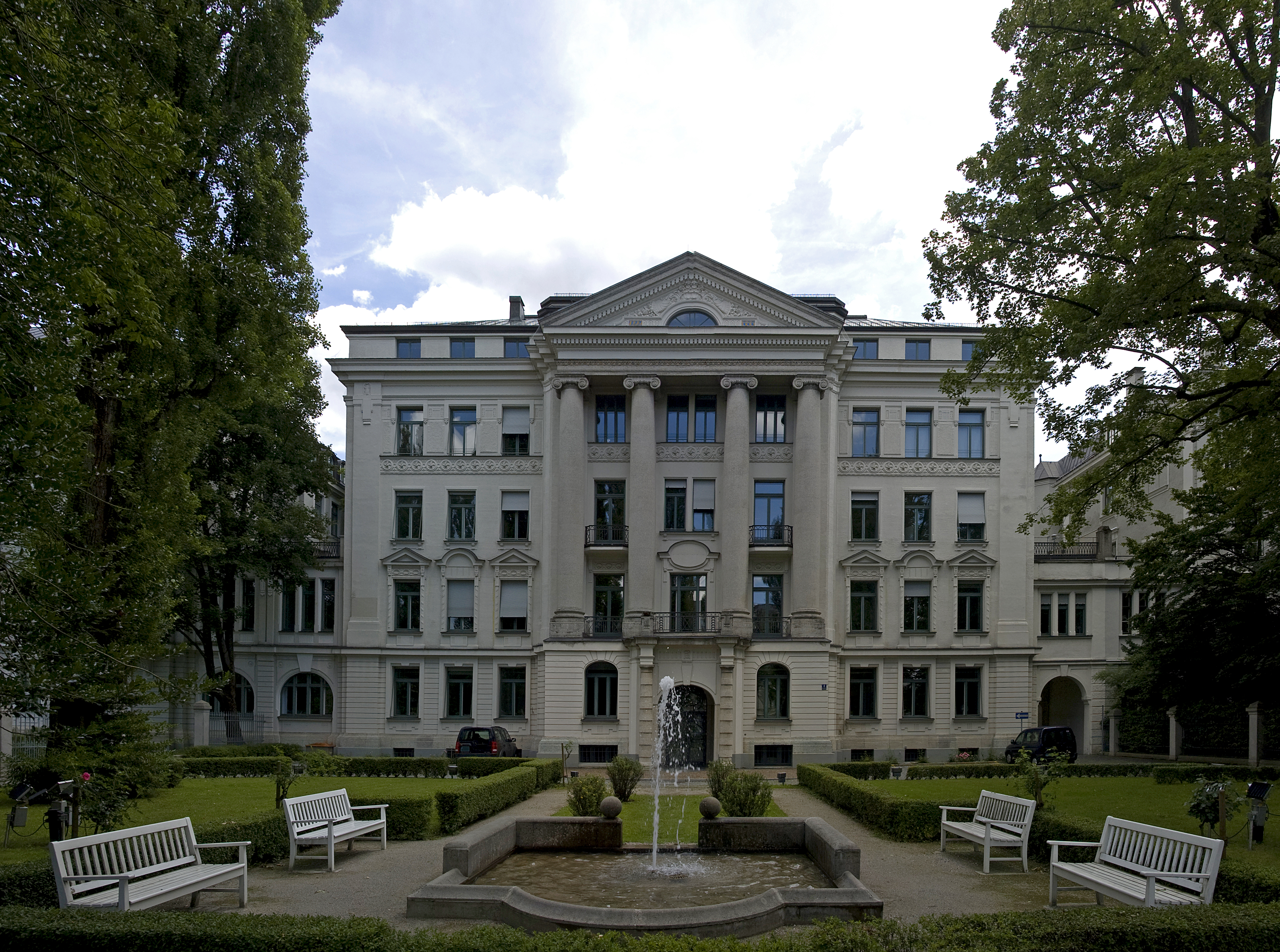 Leopoldstraße 4 - München. Ehem. herrschaftliches Wohnhaus. Jetzt Kanzlei für Patentanwälte, palastartiger Bau im klassizistischen Jugendstil, mit Stuckdekor und mächtigem Portikus, 1896–97 von Martin Dülfer; Mittelteil einer durch niedrige Zwischenbauten verbundenen Häusergruppe, siehe Nr. 6 und Schackstraße 1.This is a photograph of an architectural monument.